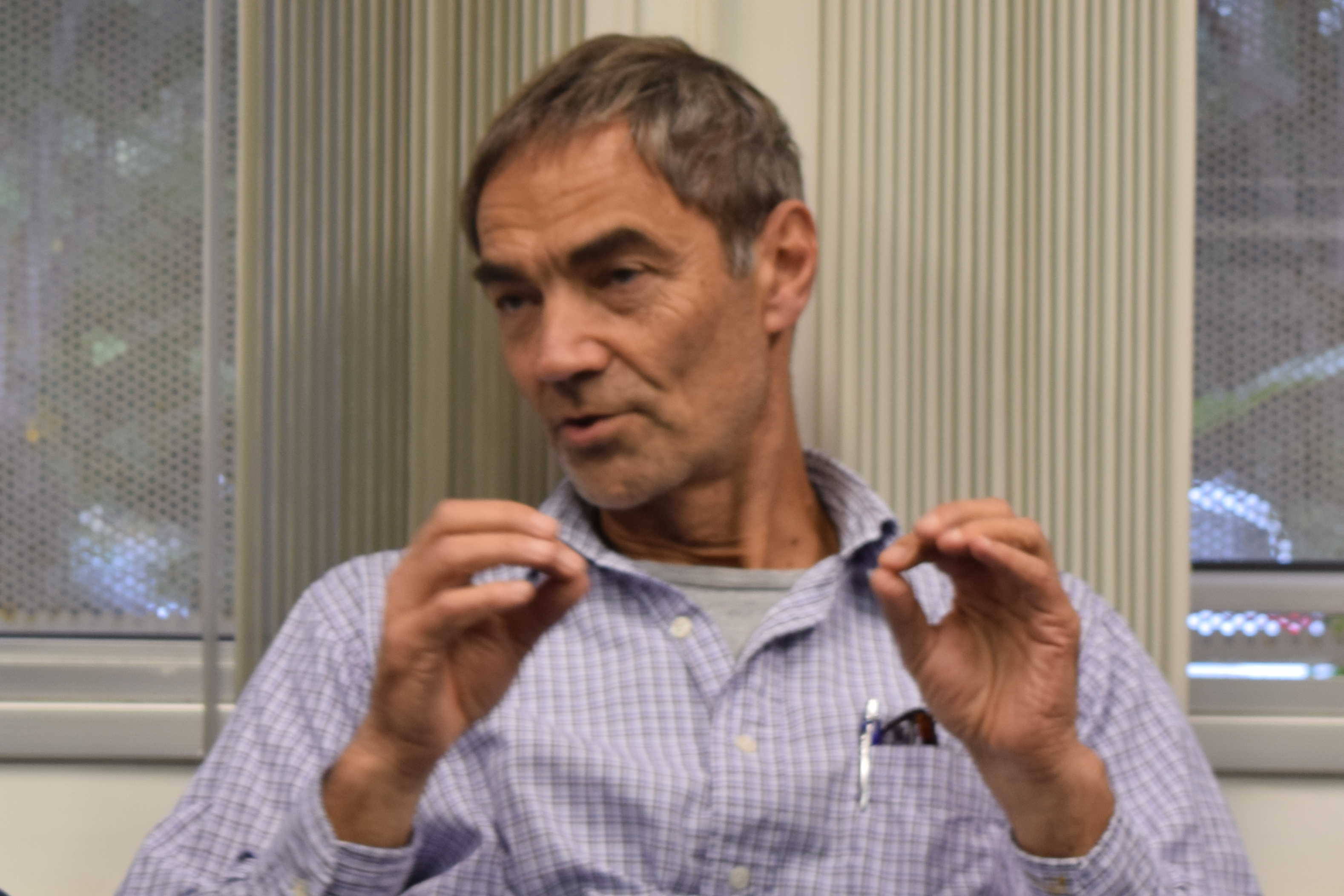 Pablo Augusto Ferrari es licenciado en Matemática por la Universidad de Buenos Aires en 1974 y Doctor en Estadística por la Universidad de San Pablo en 1982. Profesor de la USP de 1978 a 2008. Profesor visitante en Rutgers, Paris, Roma, Santiago de Chile y Cambridge. Profesor de la UBA e Investigador del CONICET a partir de 2009, integra el Grupo de Probabilidad de Buenos Aires. Investiga modelos probabilísticos de fenómenos microscópicos y su contrapartida macroscópica. Miembro de la Sociedad Bernoulli, el Institute for Mathematical Statistics y la Academia Brasileira de Ciencias. Recibió una beca Guggenheim en 1999, el Premio Consagración de la Academia de Ciencias Exactas, Físicas y Naturales en Buenos Aires en 2011 y fue nombrado fellow del International Statistical Institute en 2013.